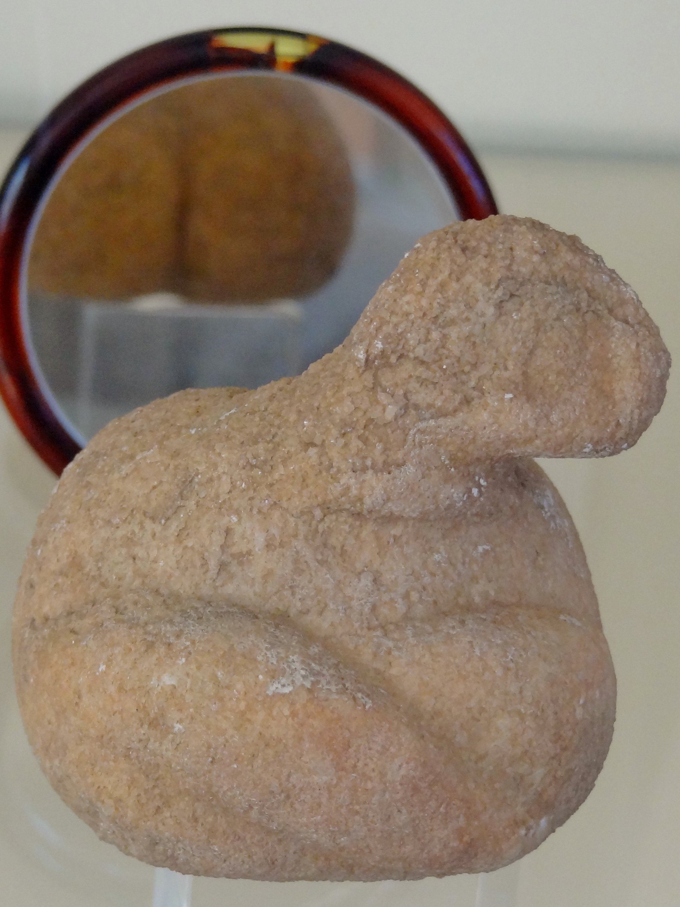 „Fette Frau von Saliagos“ aus dem 4. Jahrtausend v. Chr. im Archäologischen Museum von Parikia auf Paros, Kykladen, Griechenland